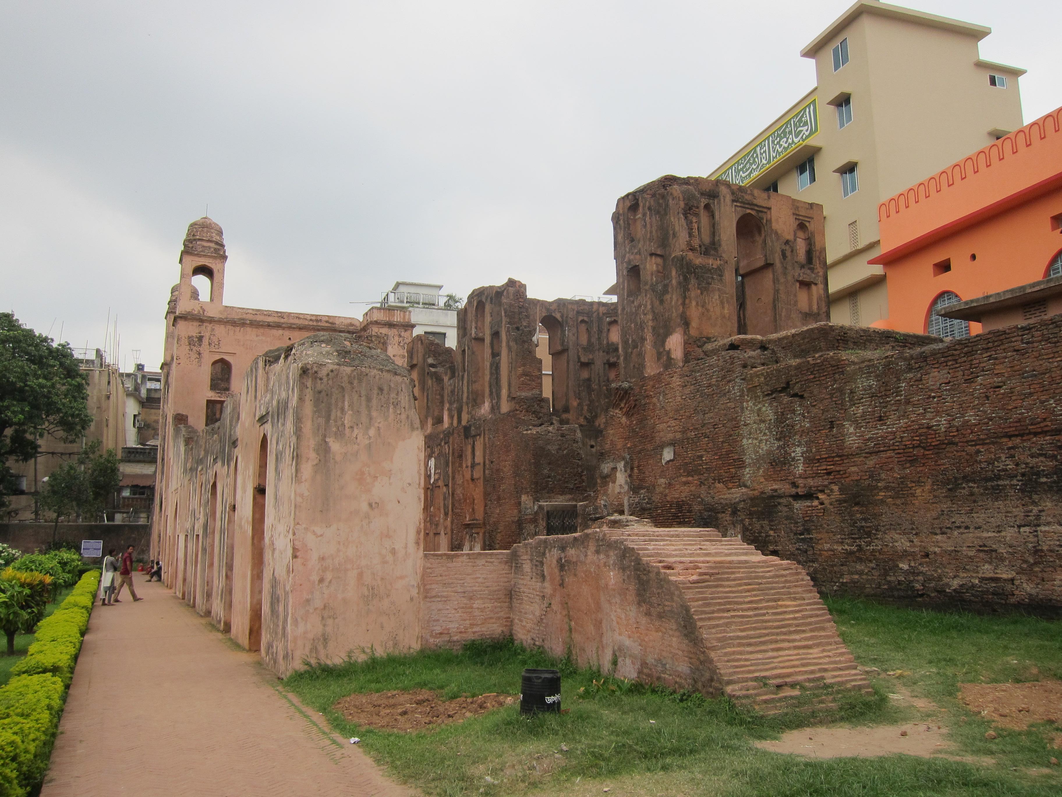 লালবাগ দুর্গ